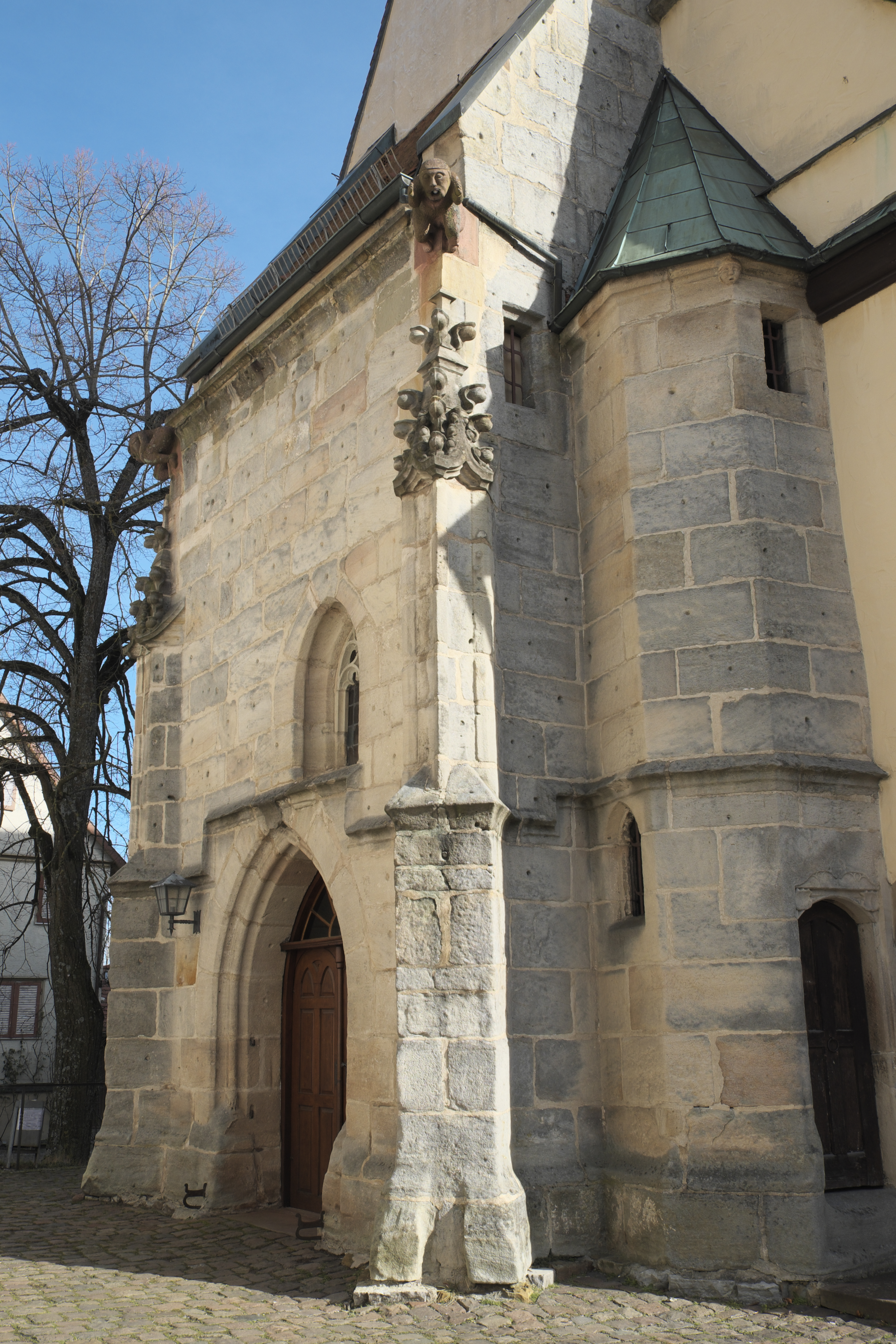 Evangelische Stadtkirche in Rosenfeld im Zollernalbkreis (Baden-Württemberg/Deutschland), Westvorhalle